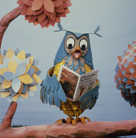 Meneer de Uil uit de Fabeltjeskrant in zijn boom